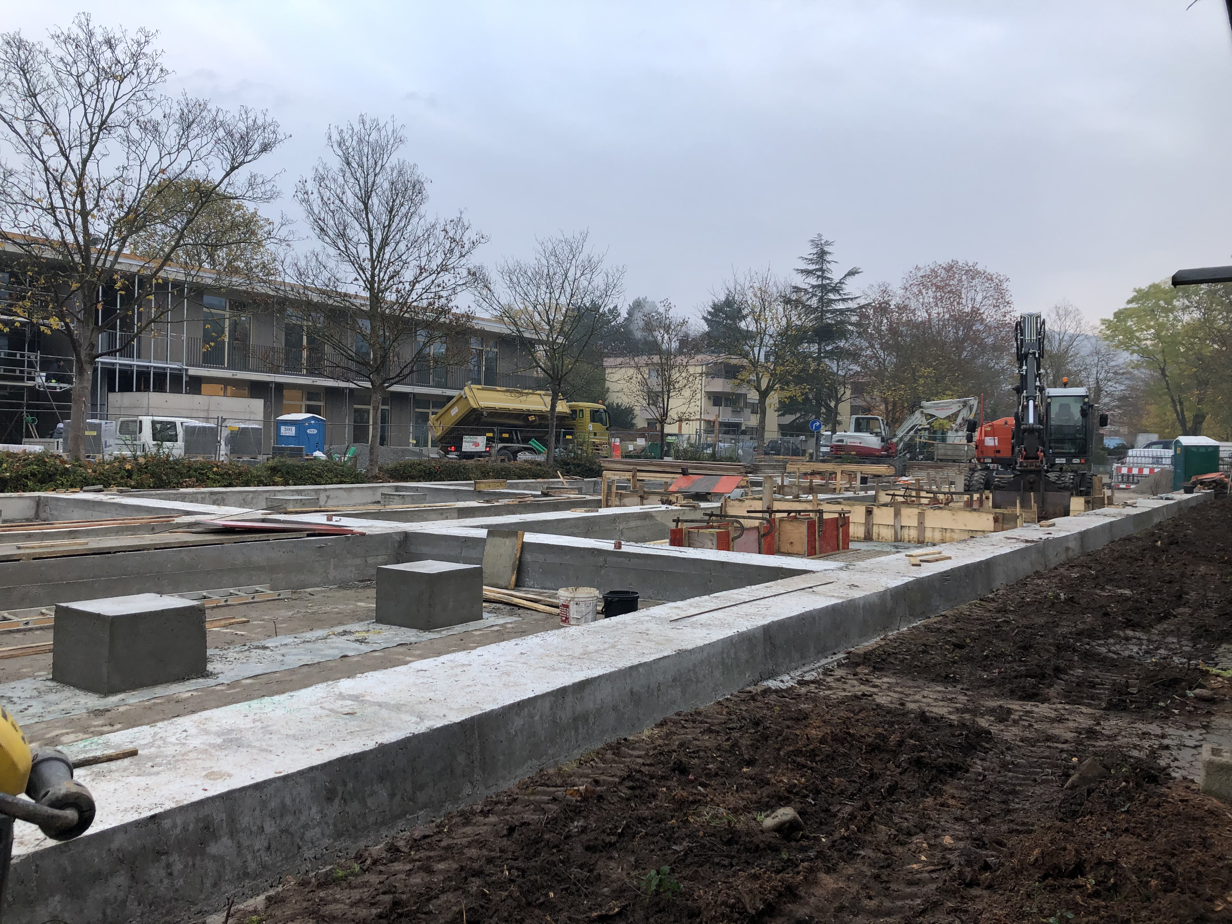 Das Fundament für den Interimsbau am KGS wird gelegt.